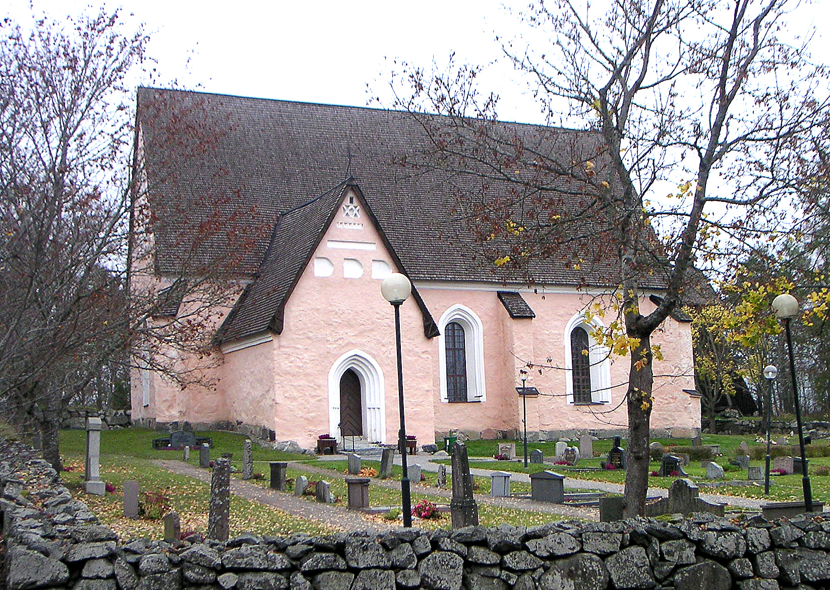 Hjälsta kyrka